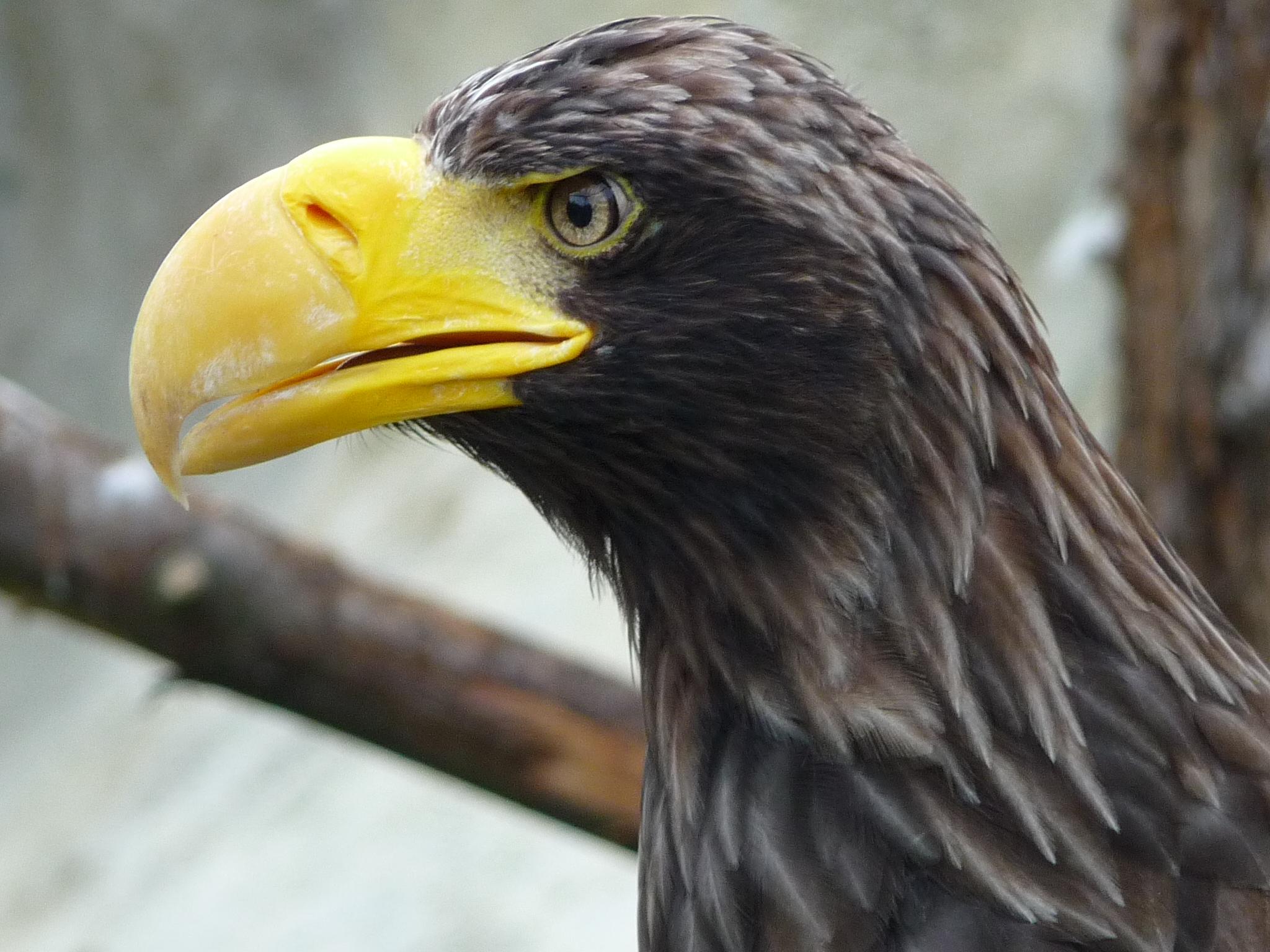 Kopf eines Riesenseeadlers (Haliaeetus pelagicus)